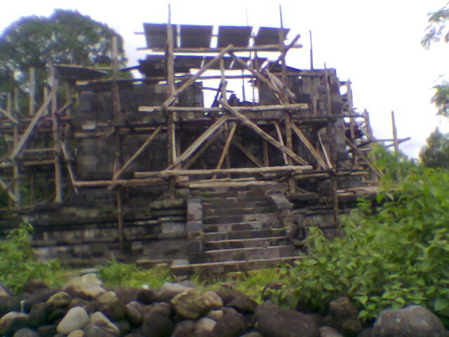 Gemaakt door Meursault2004 op 16 december 2005.